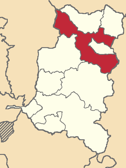 Mapa localizacor del cantón en Chimborazo, Ecuador